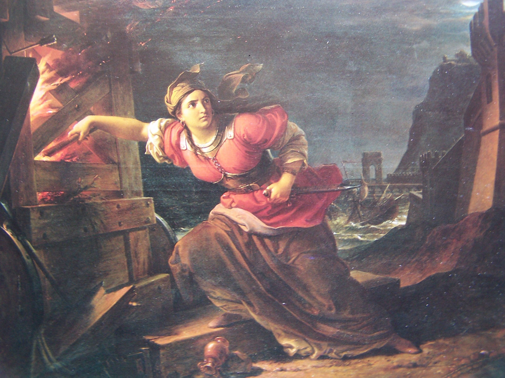 Stamura che incendia le macchine all'assedio di Ancona